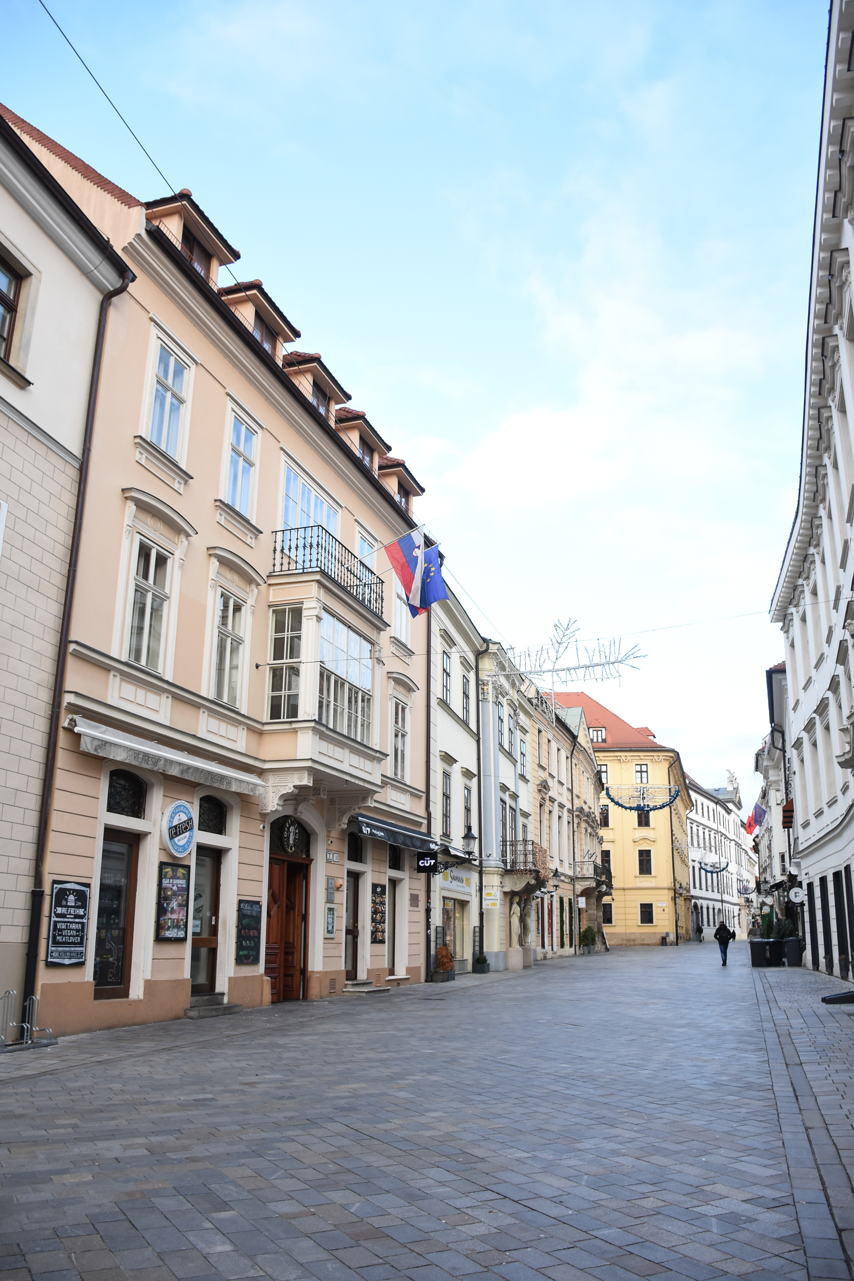 Veleposlaništvo Republike Slovenije v Bratislavi (Slovaška) Embassy of the Republic of Slovenia in Bratislava (Slovakia) Botschaft der Republik Slowenien in Bratislava (Slowakei) Ambassade van de Republiek Slovenië in Bratislava (Slowakije) Ambassade de la République de Slovénie à Bratislava (Slovaquie) Embajada de la República de Eslovenia en Bratislava (Eslovaquia)